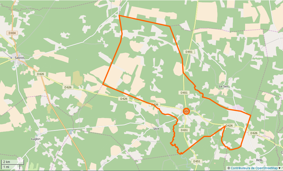 Labrit Limite communale This map may be incomplete, and may contain errors. Don't rely solely on it for navigation.